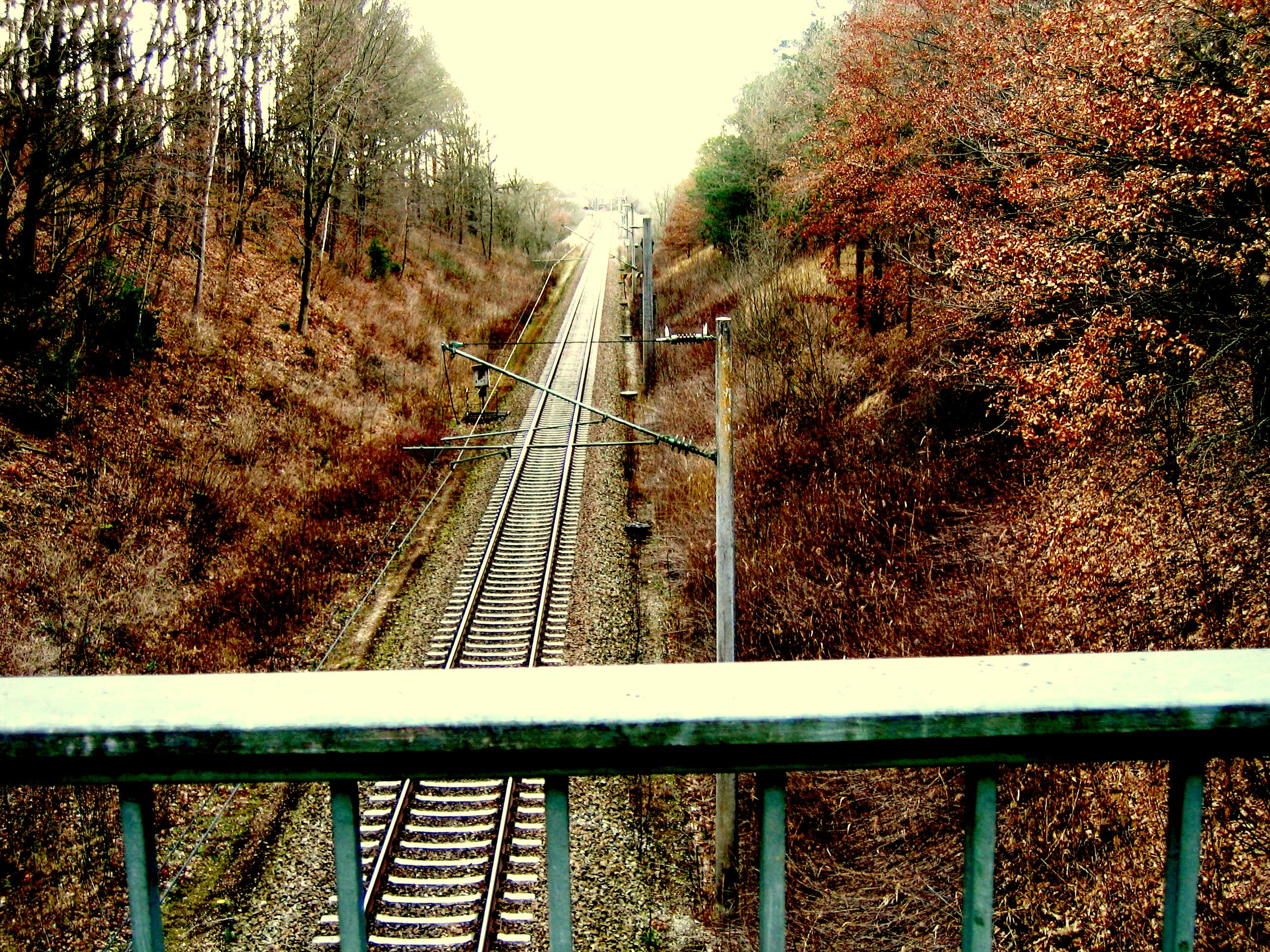 Der Eisenbahneinschnitt bei Unterhausen.